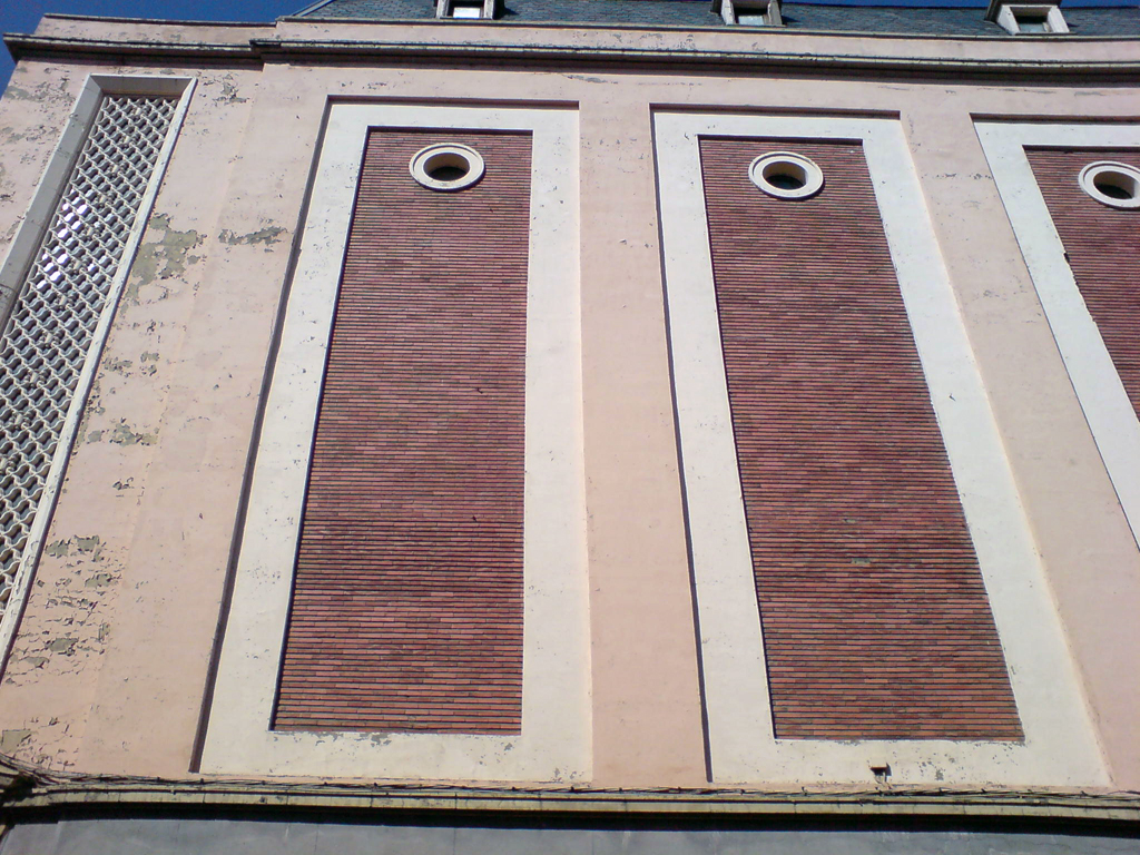 Teatro Emperador.